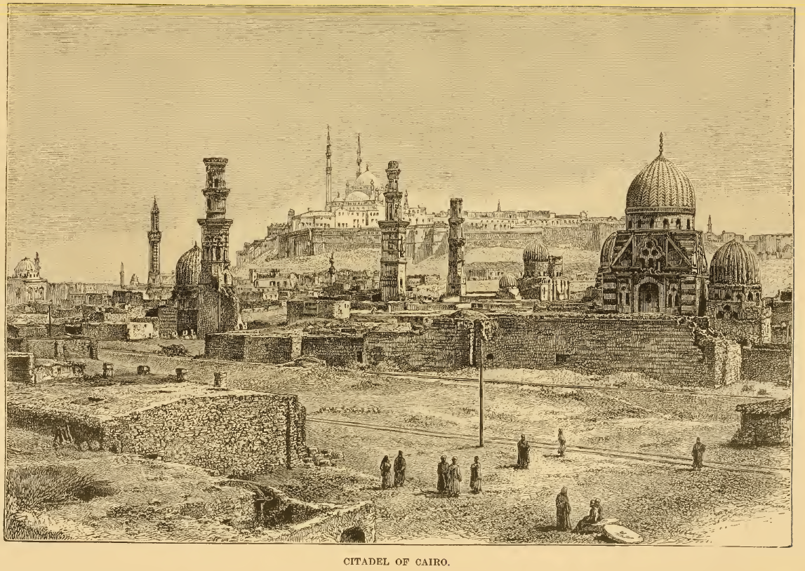 Pohled na Káhiru v roce 1896, Citadela a mešity